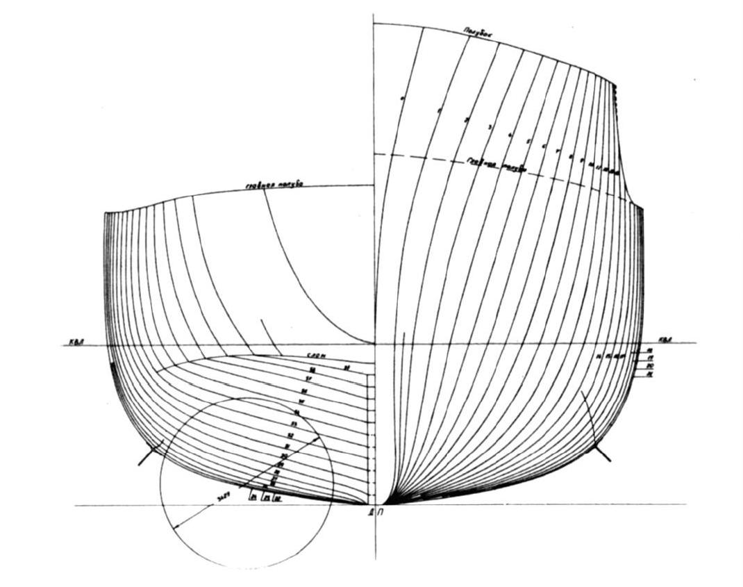 Проекция «корпус» теоретического чертежа «американского эсминца» (проект 10921). Чертёж выполнен в ЦНИИ-45 в 1939 году.